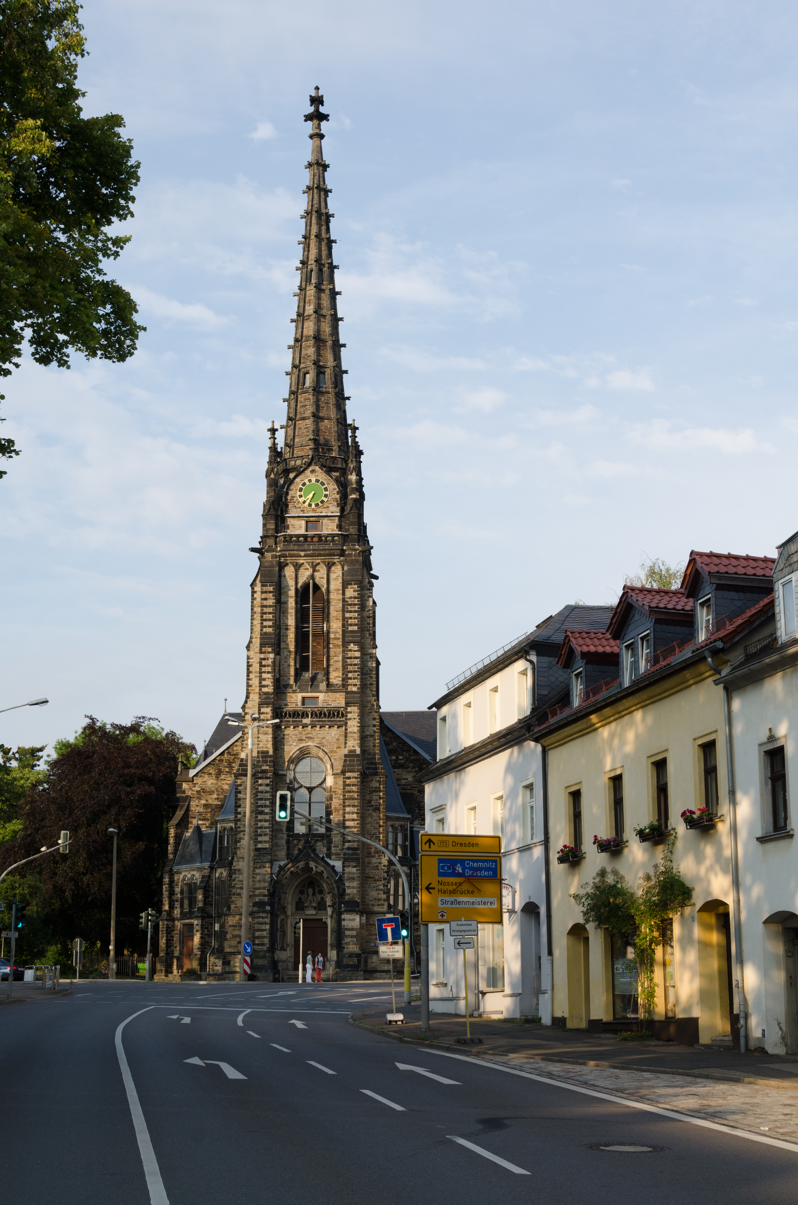 Freiberg, Jacobikirchturm